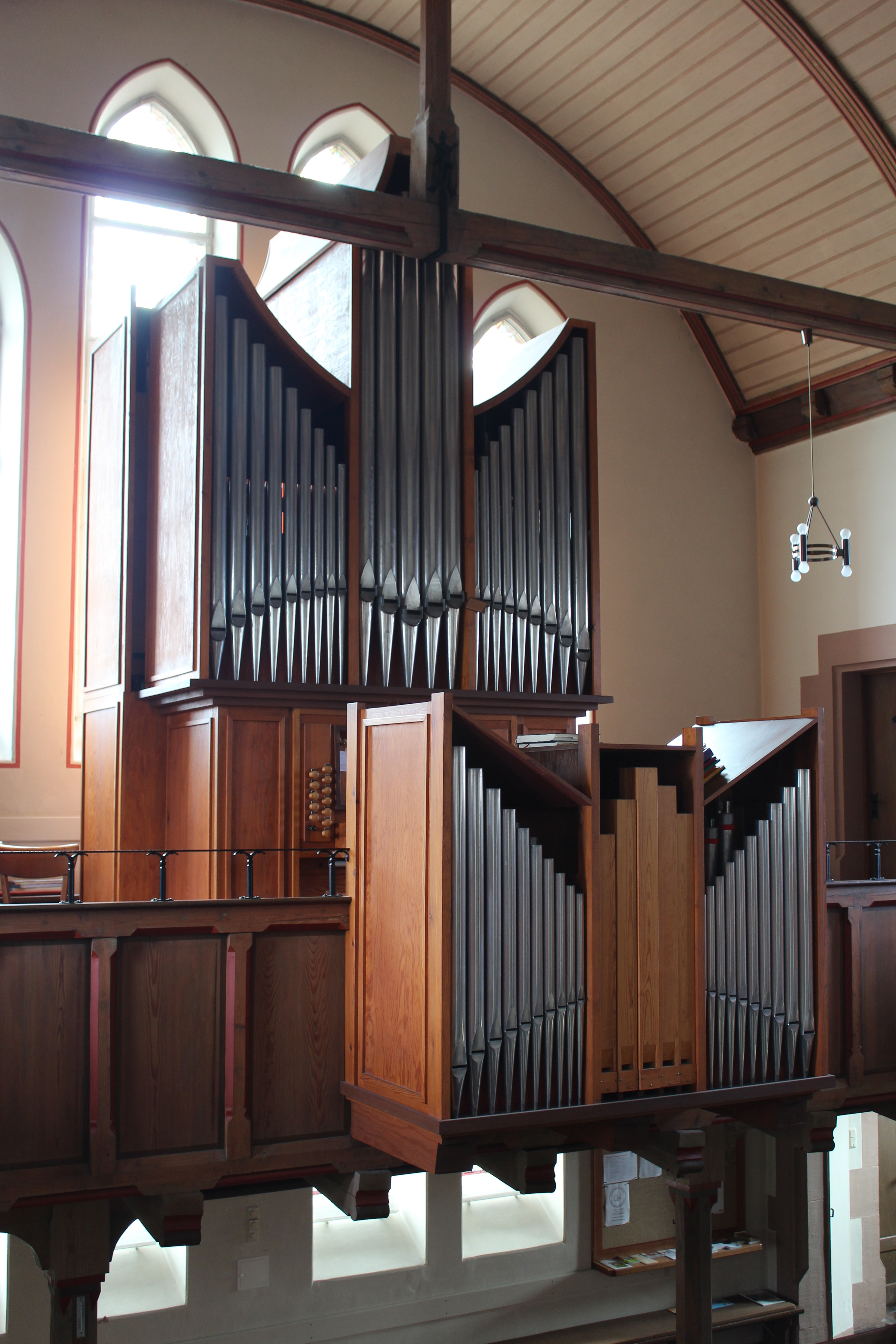 Böttner-Orgel der Evangelischen Kirche St. Martin zu Marburg-Cappel